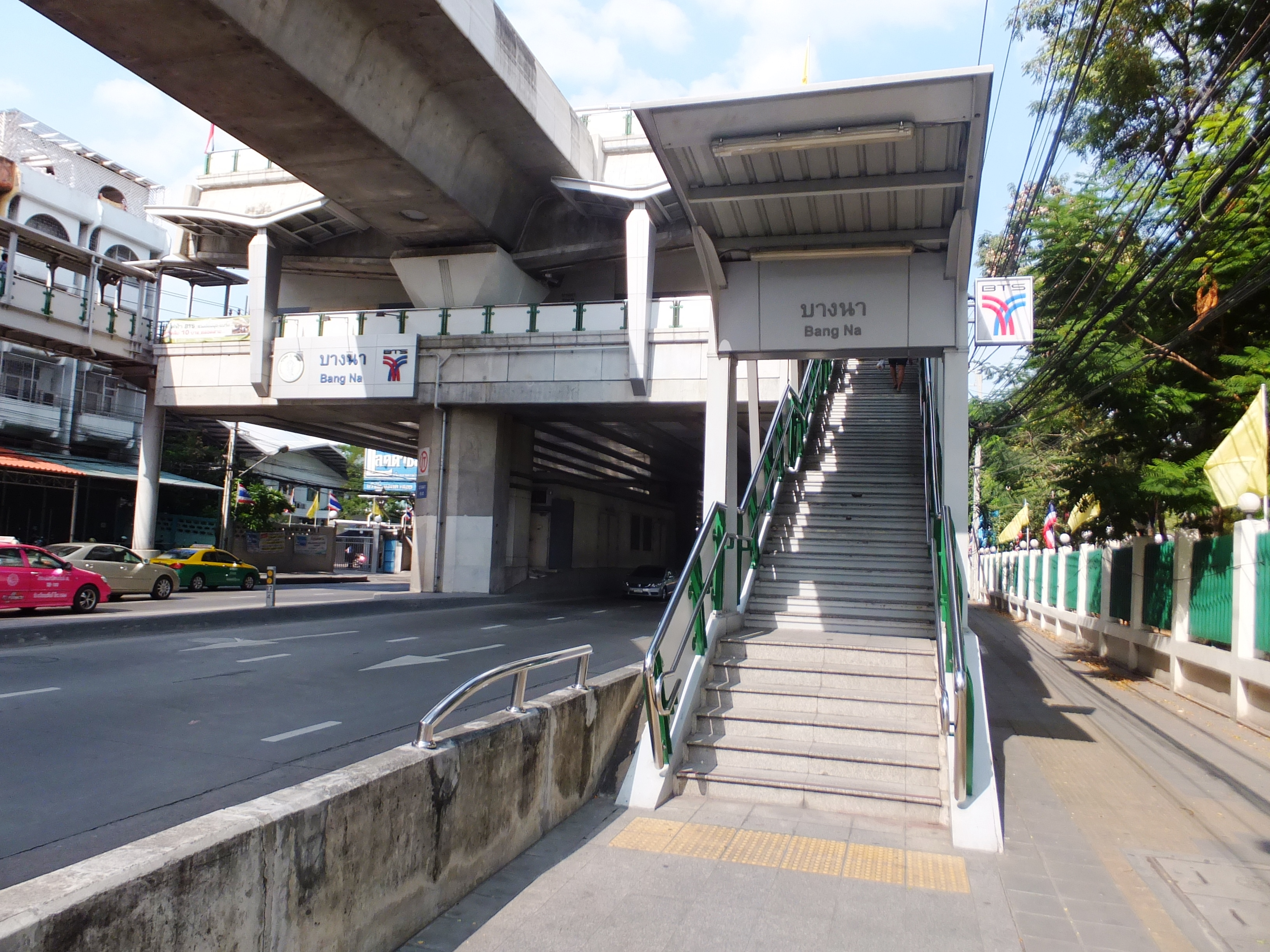 BTSバーンナー駅の出入口。